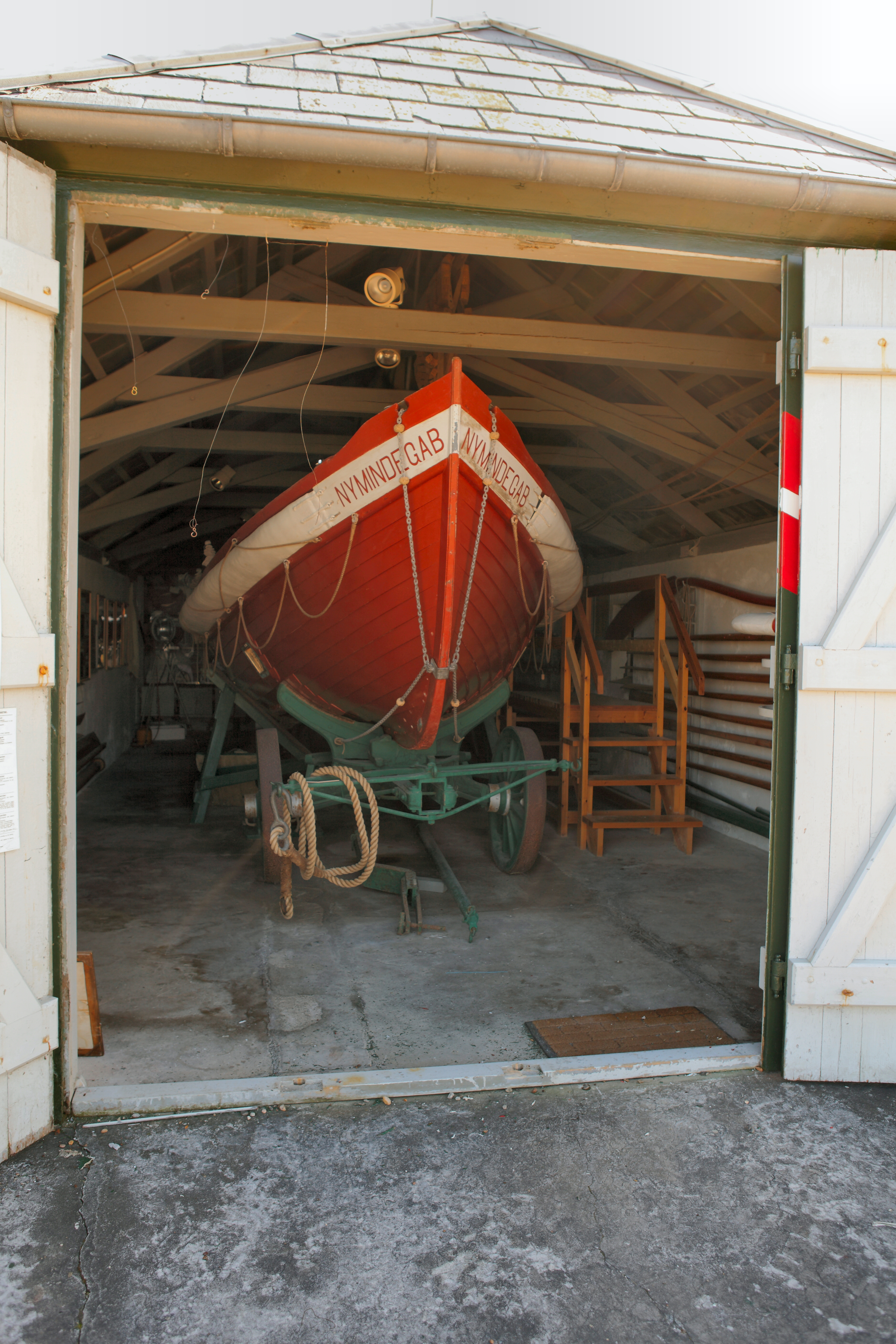 Nymindegab redningsstation (museum) med delvis åben port